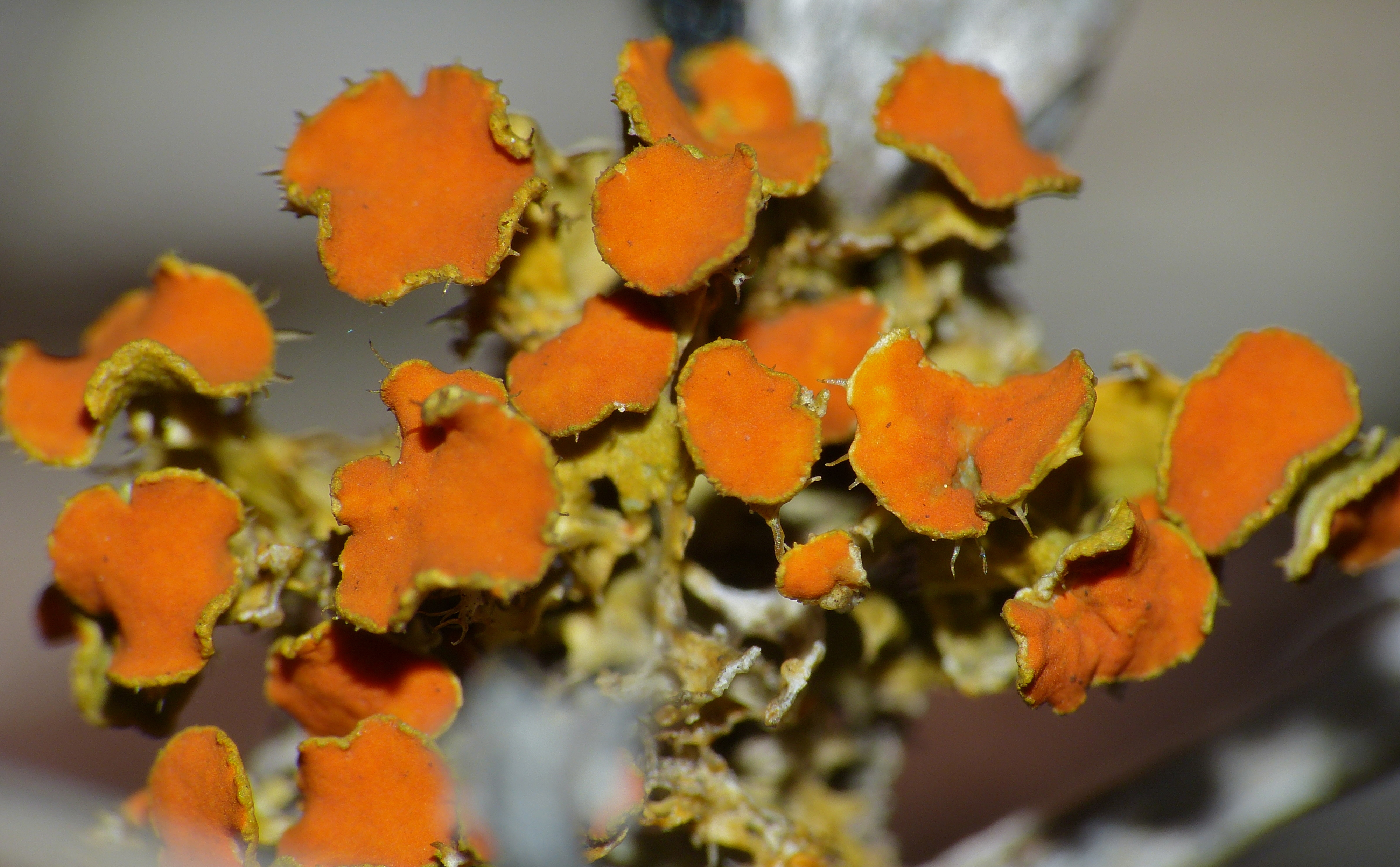 Octon, Hérault, FRANCE